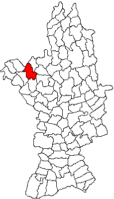 Categorie:Hărţi ale judeţului Olt